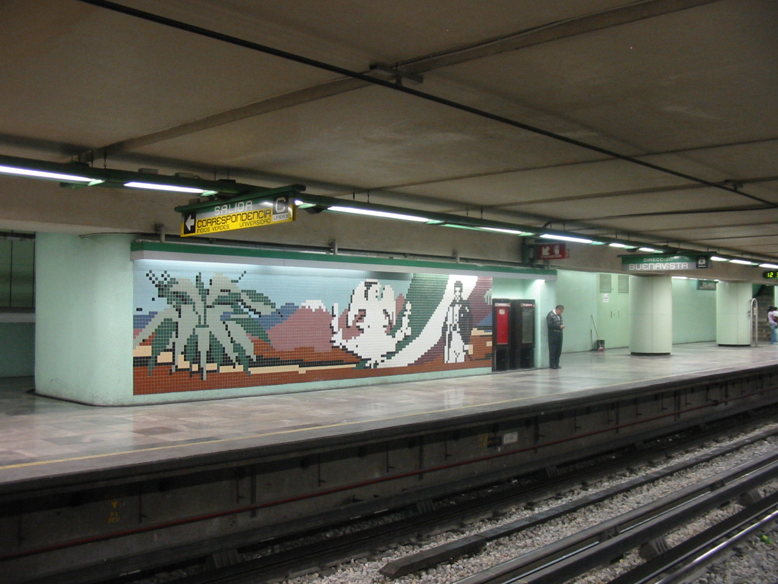 Tile Mural in Metro Guerrero in Mexico City depicting Guerrero